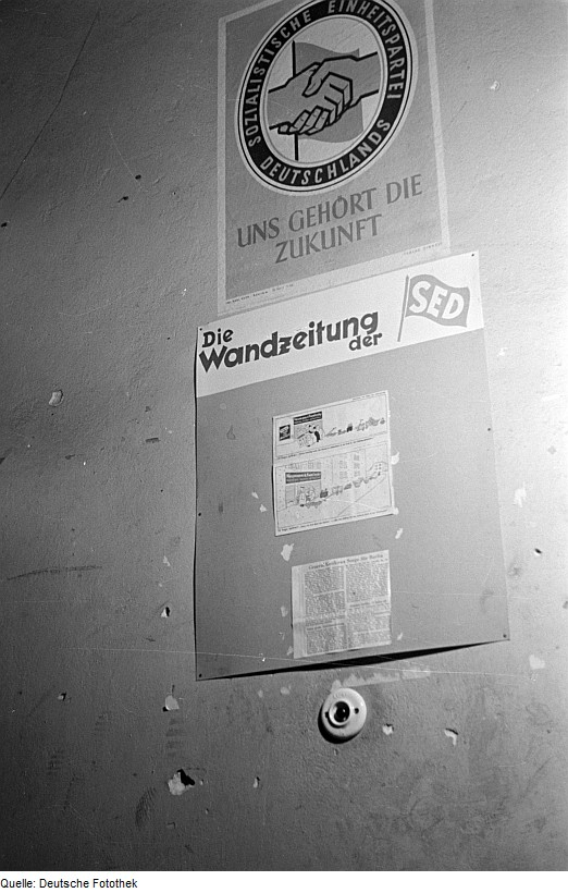 Original image description from the Deutsche Fotothek Winter 46/47